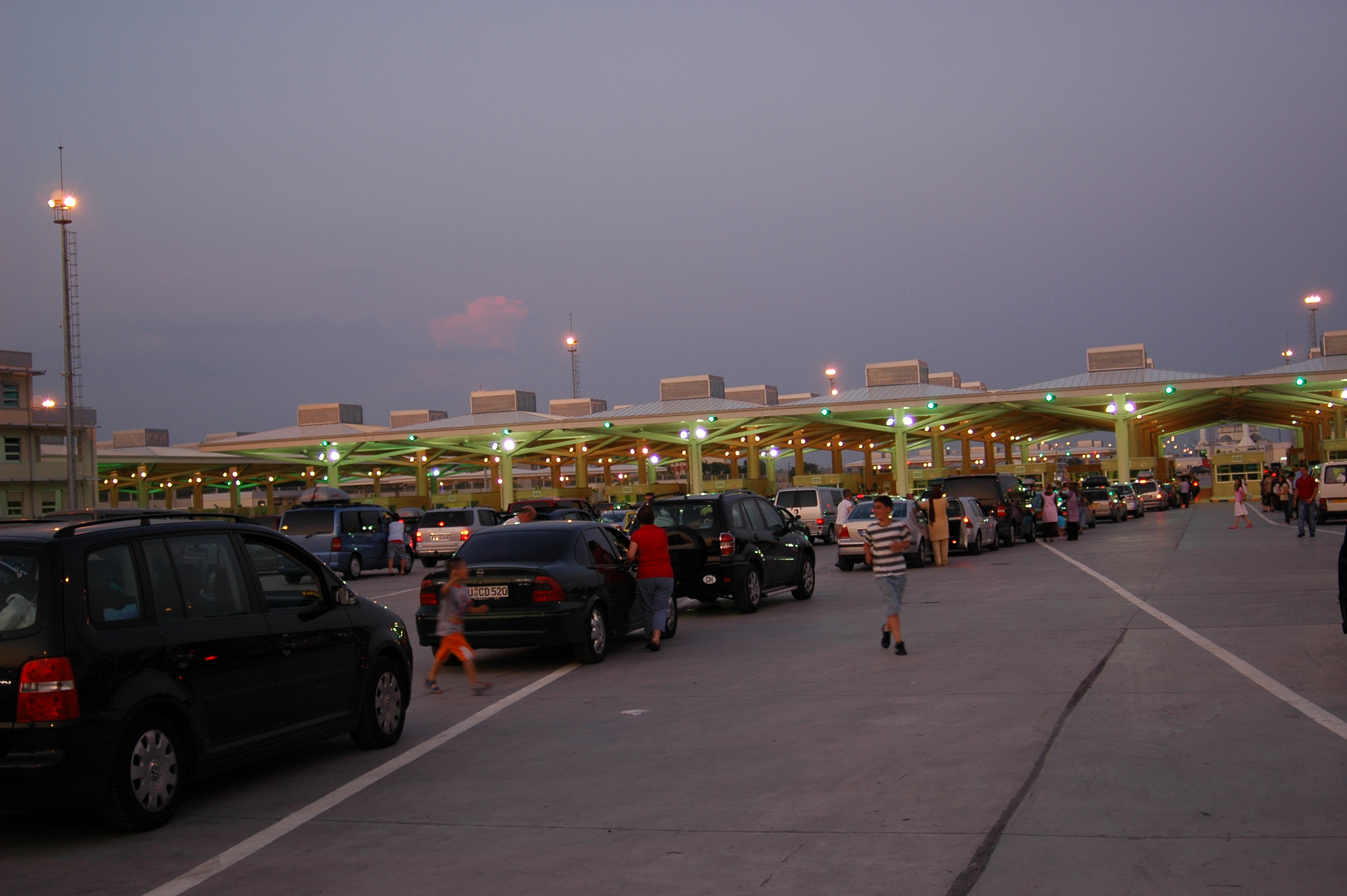 Kapikule Türkiye